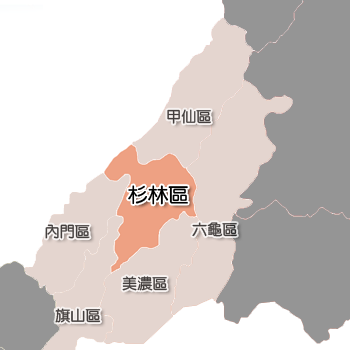 杉林區相對位置